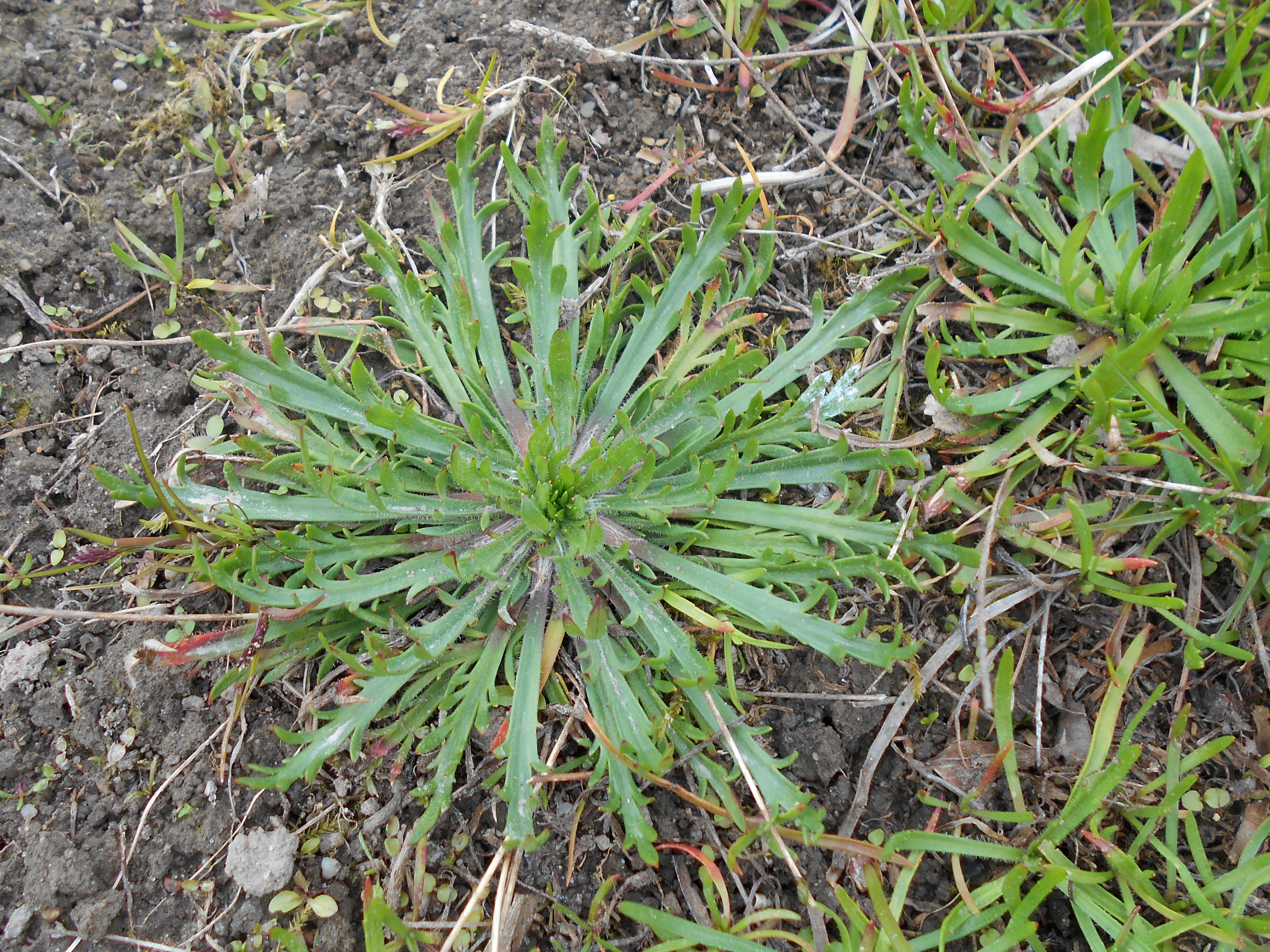 Babka pierzasta (Plantago coronopus), Ogród Botaniczny UMCS w Lublinie.